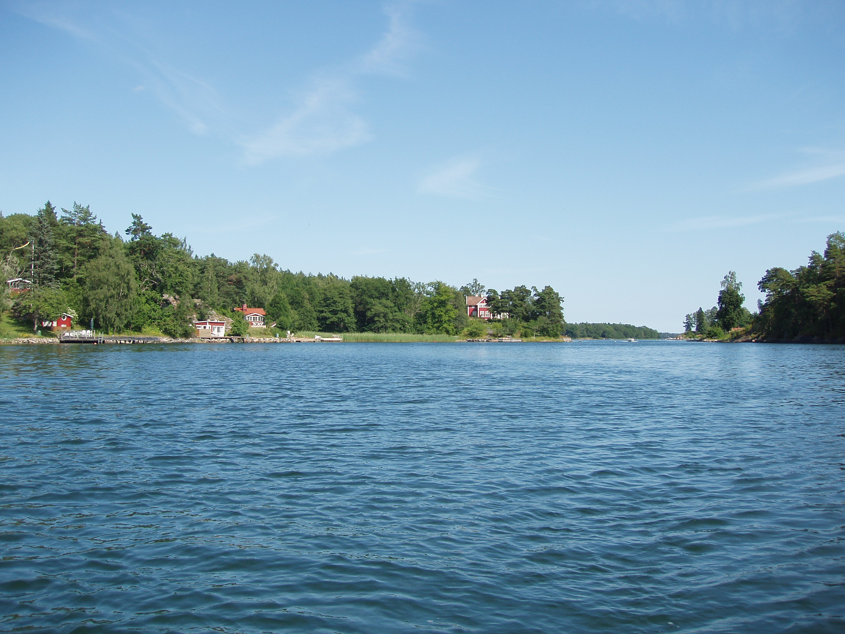 Siarösundet mot öster med Siarö till vänster och Ljusterö till höger i bild. Den smalaste delen av sundet till höger i bild.